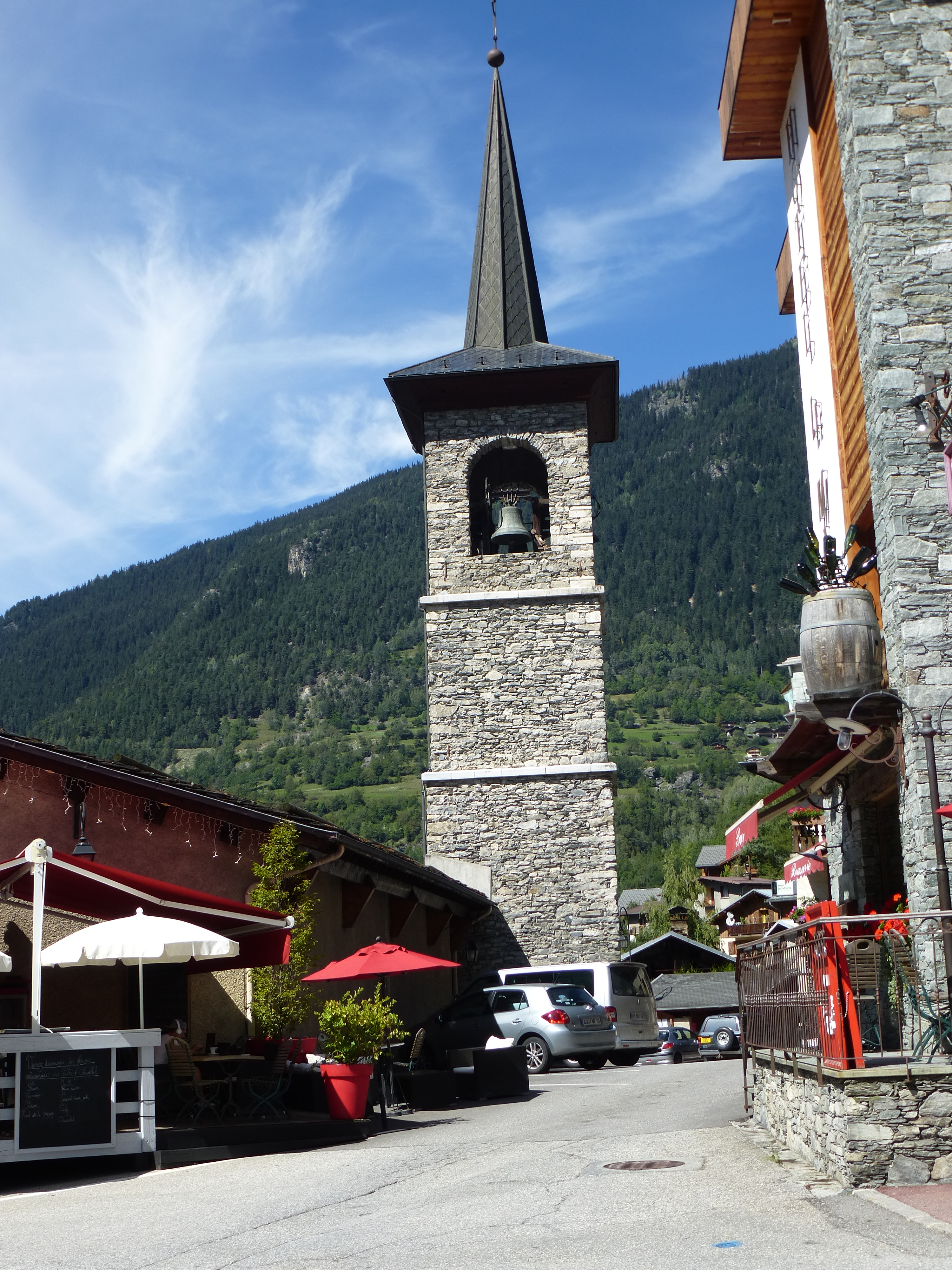 ste foy tarentaise